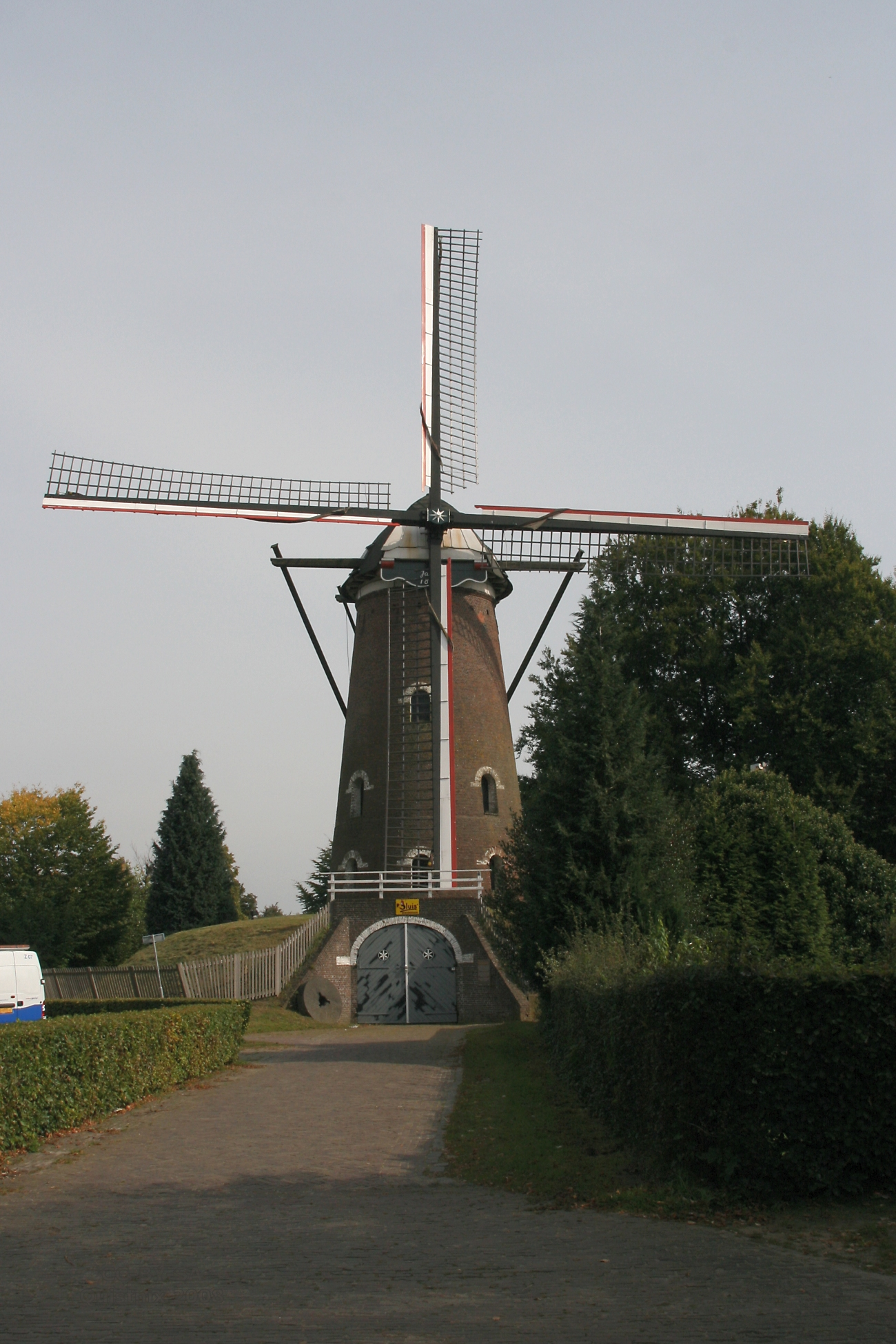 Vessem: Molen Jacobus (of Jacobusmolen)